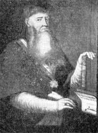 Prelado y apologista español, nacido en Vélez-Málaga